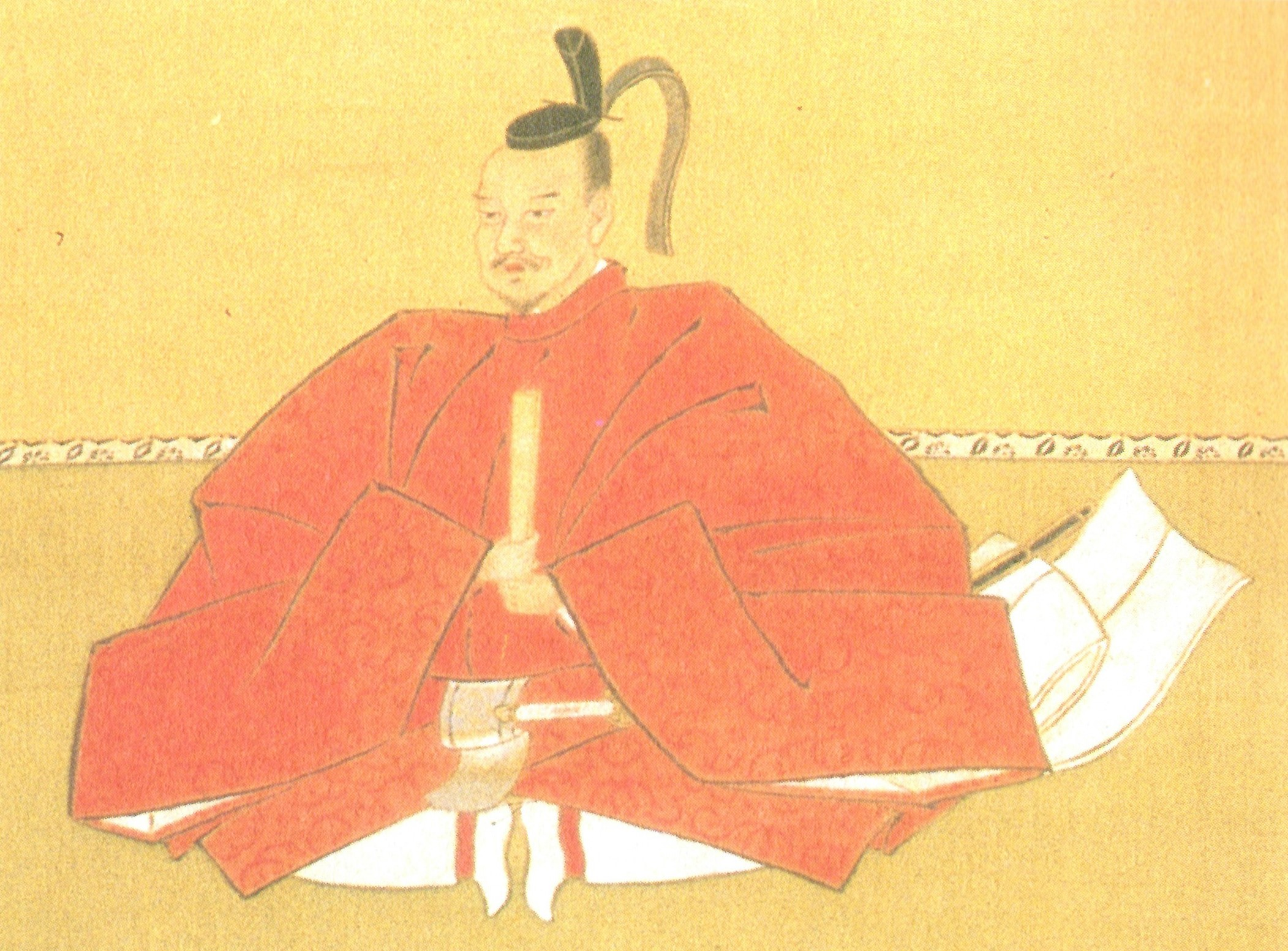 山岡景隆の肖像。